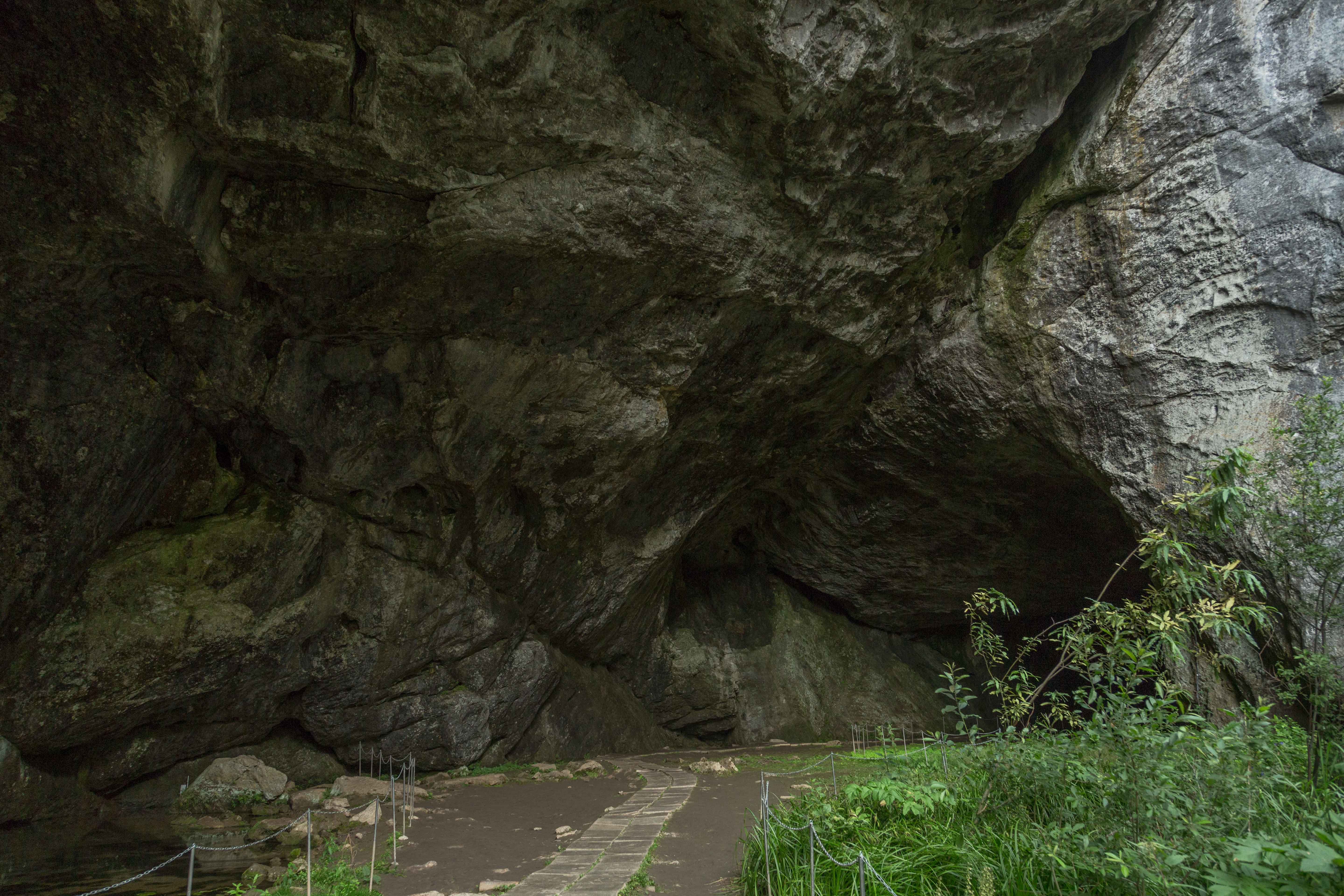 Капова пещера (Шульган-Таш), Бурзянский район This image is related to the protected area of Russia number 0220101